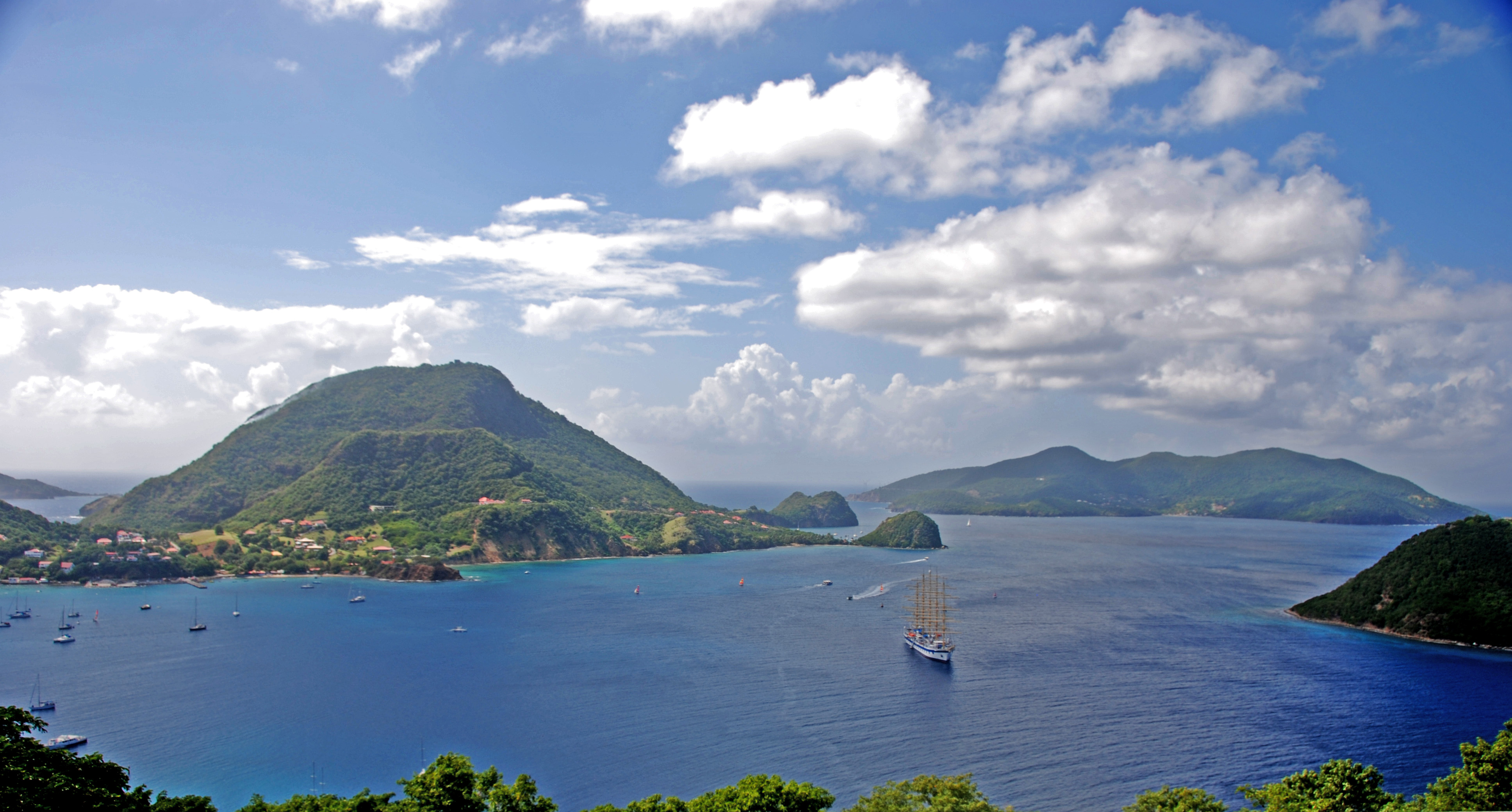 View from Fort Napoleon, Iles des Saintes, Guadeloupe